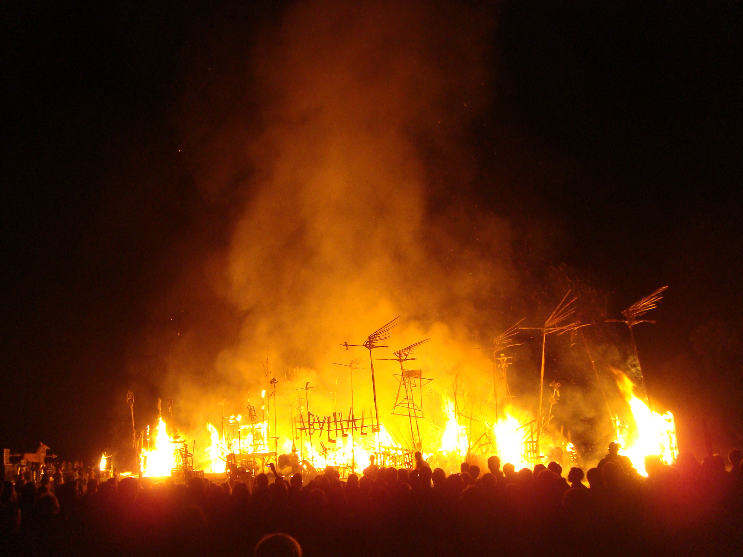 Abschlussfeuer beim Weinfest in Altkötzschenbroda (Elbwiese)